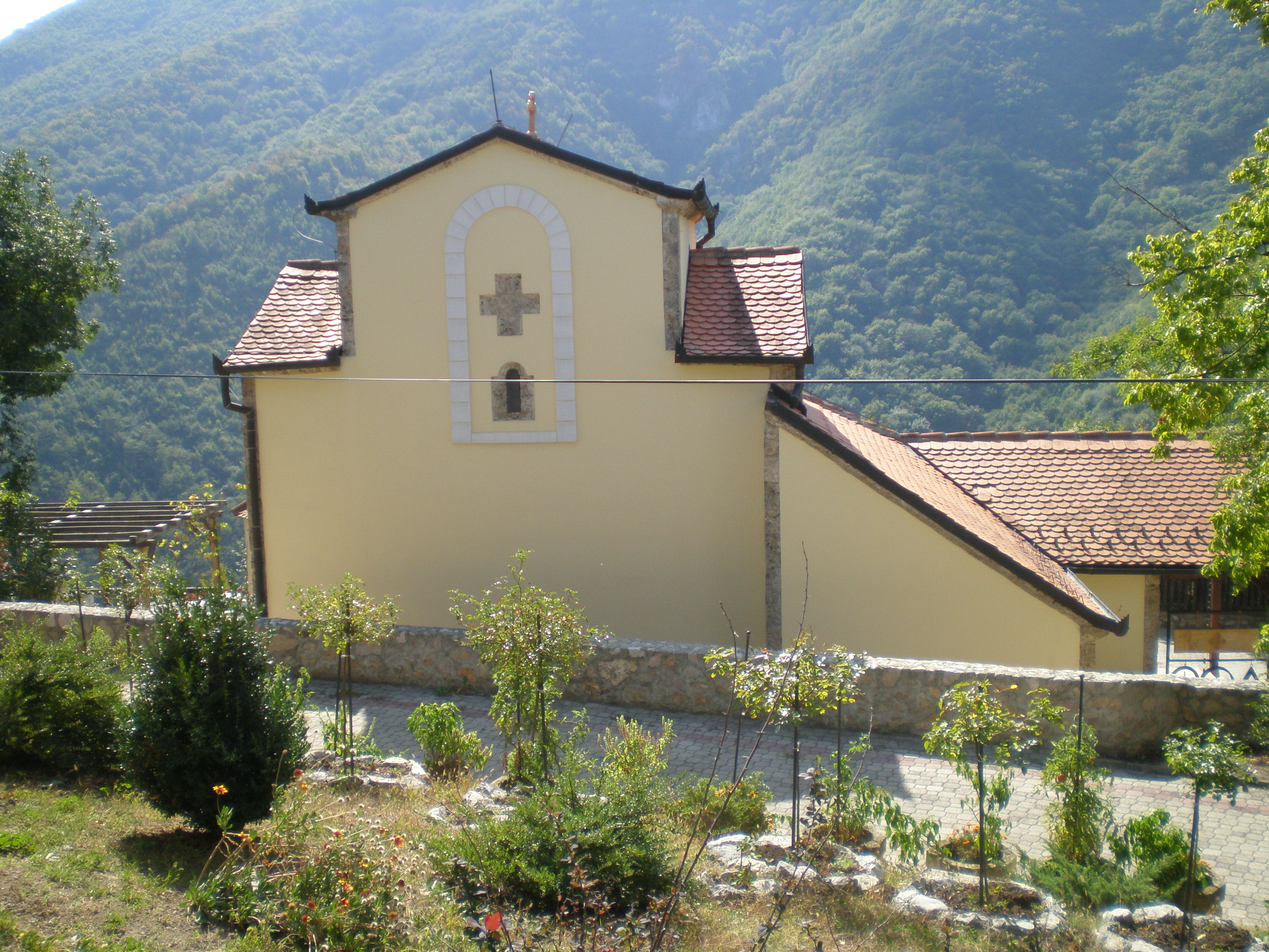 Манастир Успење Пресвете Богородице